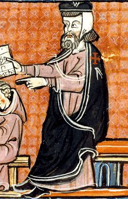 Detail du Capbreu d'Argeles (1292)